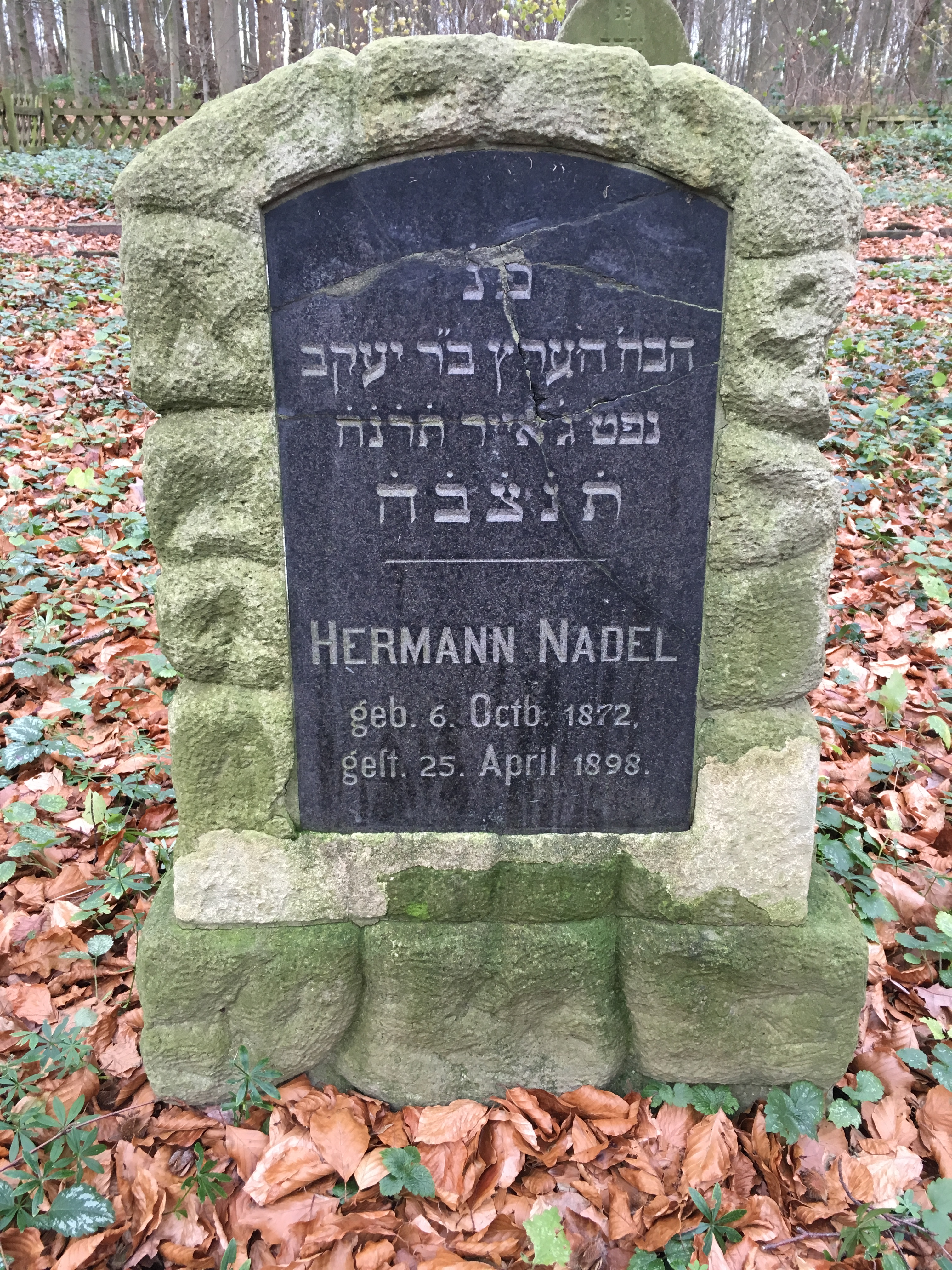 Graffsteen op’n Jöödschen Karkhoff Cuxhoben